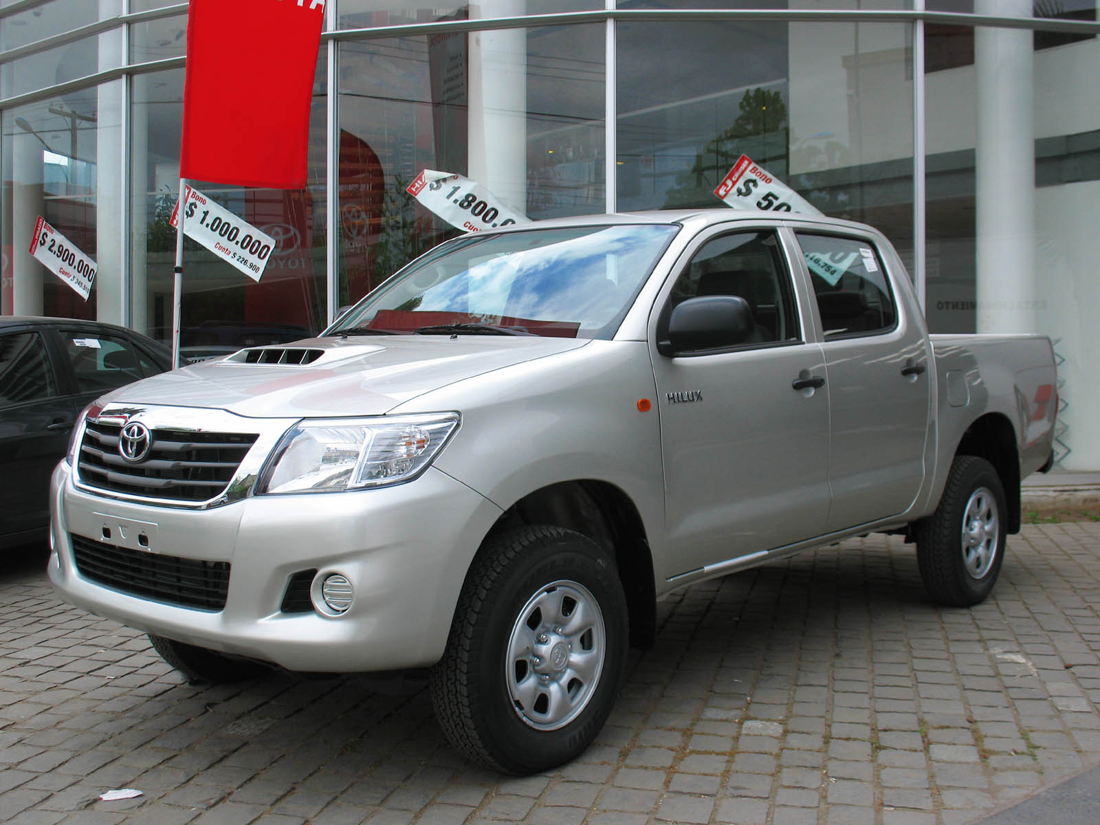 toyota hilux crew